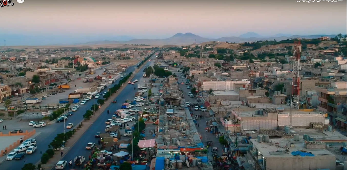 کوردی: دیمەنێکی زەڕایەن